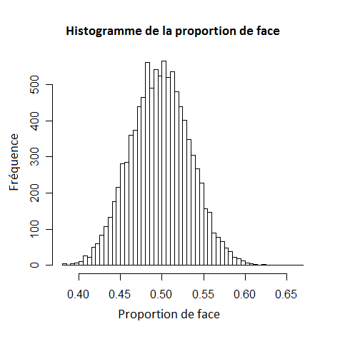 Histogramme de proportion de face dans un jeu de pile ou face : 10000 jeux de 200 lancers